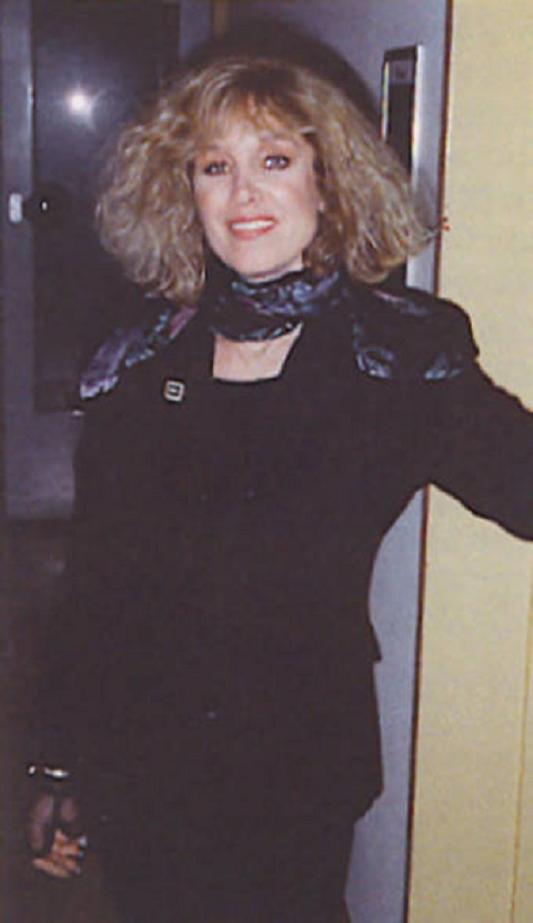 Vicki na afloop van haar solo concert in Den Haag 1989